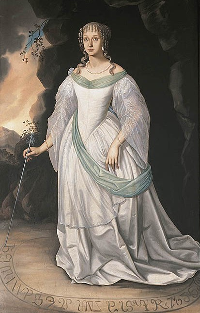 Perchta von Rosenberg även kalla den "Vita Frun"